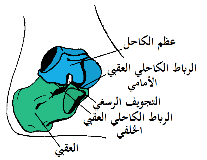 عظما العقبي والكاحل.